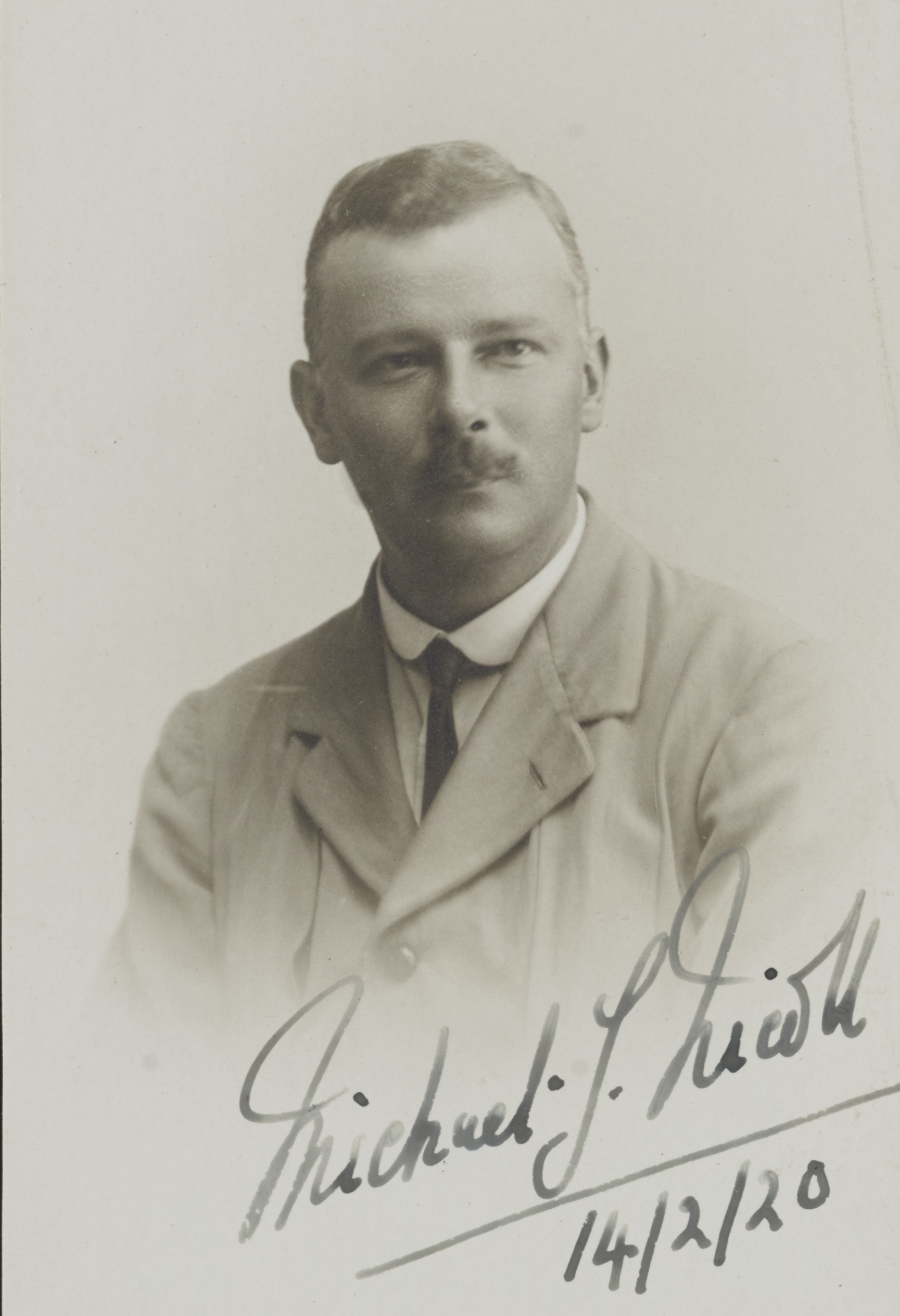 M J Nicoll, 1920